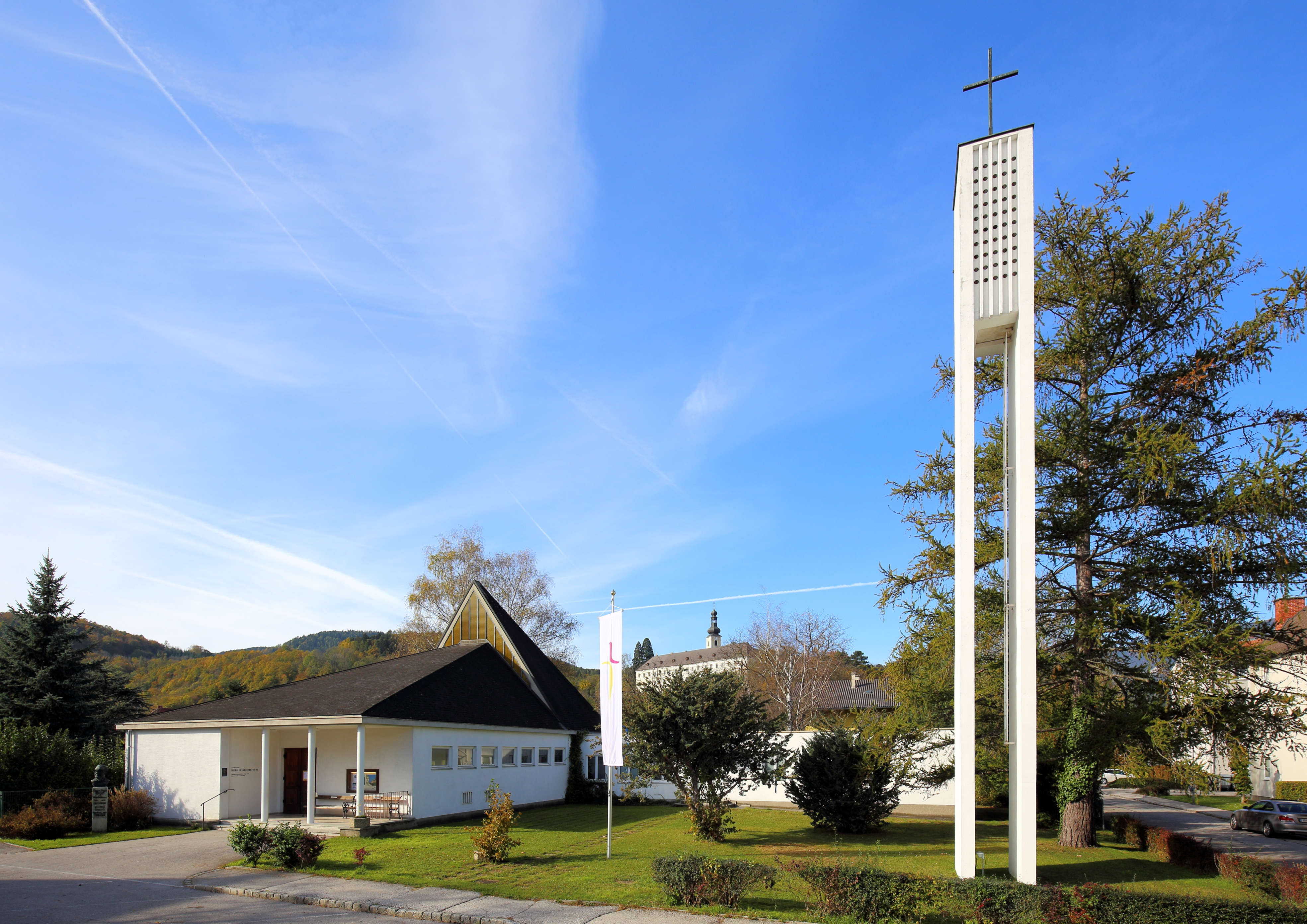 Evangelische Kirche in der niederösterreichischen Stadt Gloggnitz. Die Dreieinigkeitskirche mit frei stehendem, hohem Glockenturm wurde in den Jahren 1967/68 nach Plänen von Rudolf Angelides anstelle einer aus dem Jahre 1948 stammenden Notkirche erbaut.